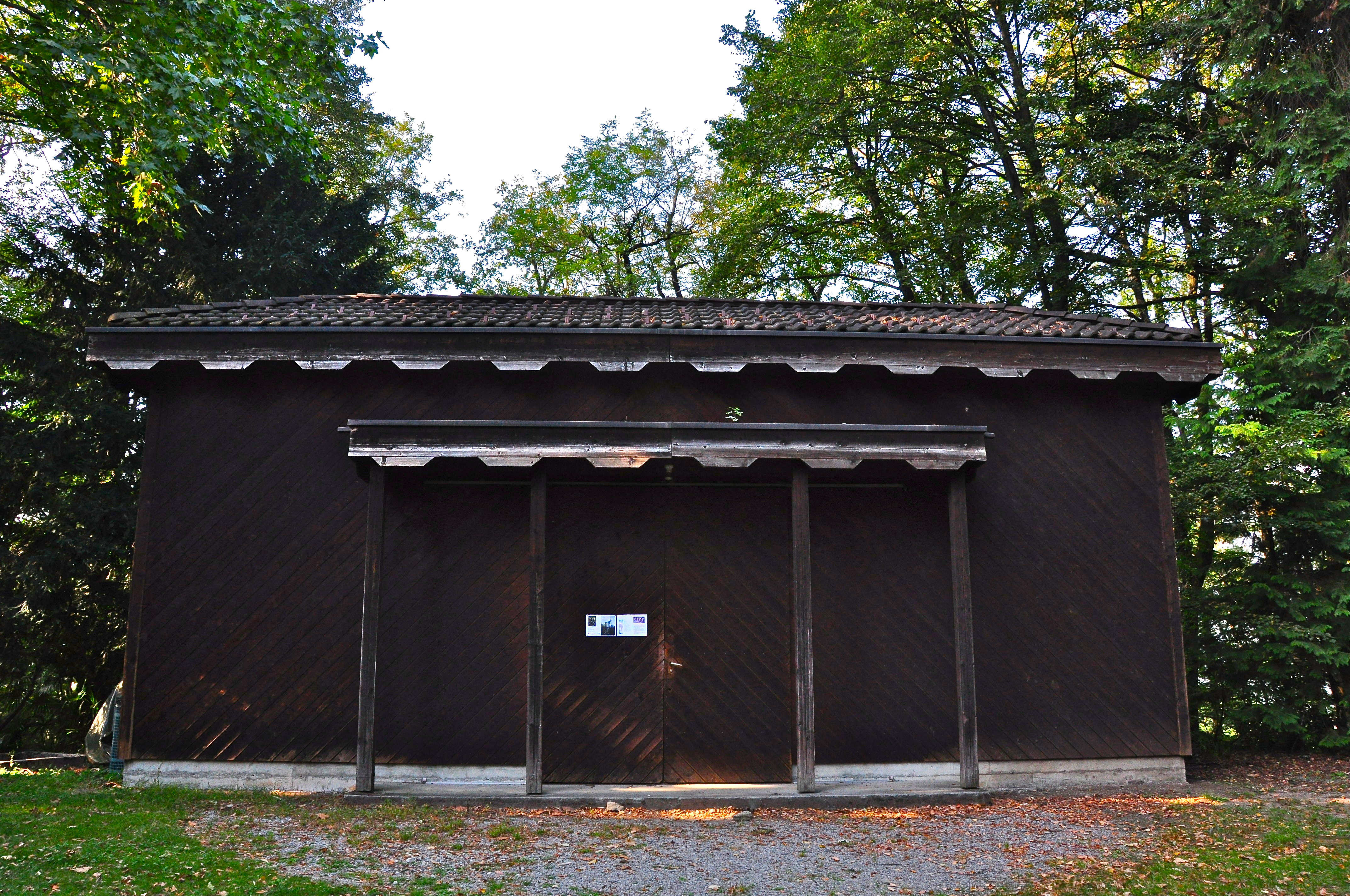 Elisarion (facciata frontale), Monte Verità